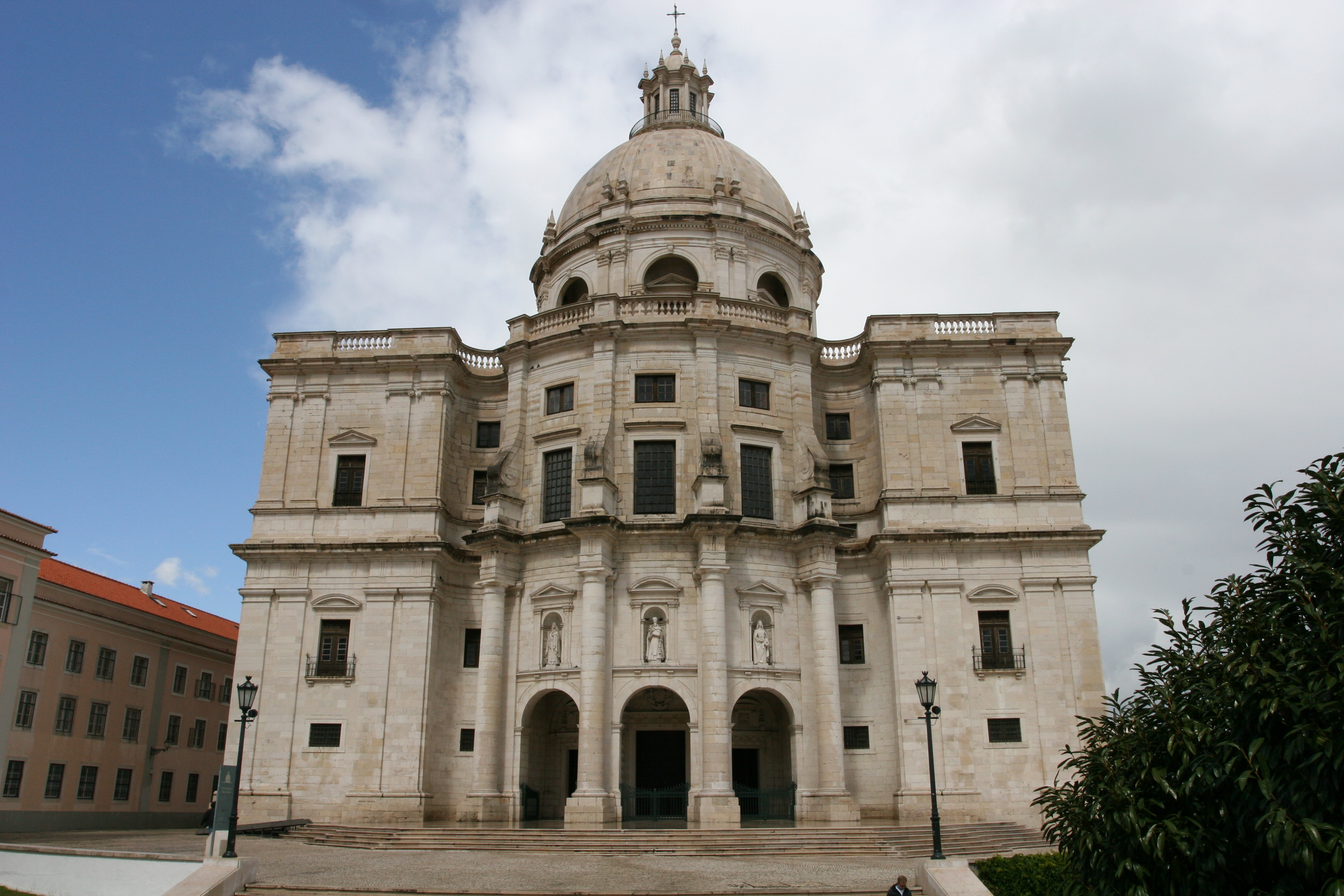 Panteão Nacional